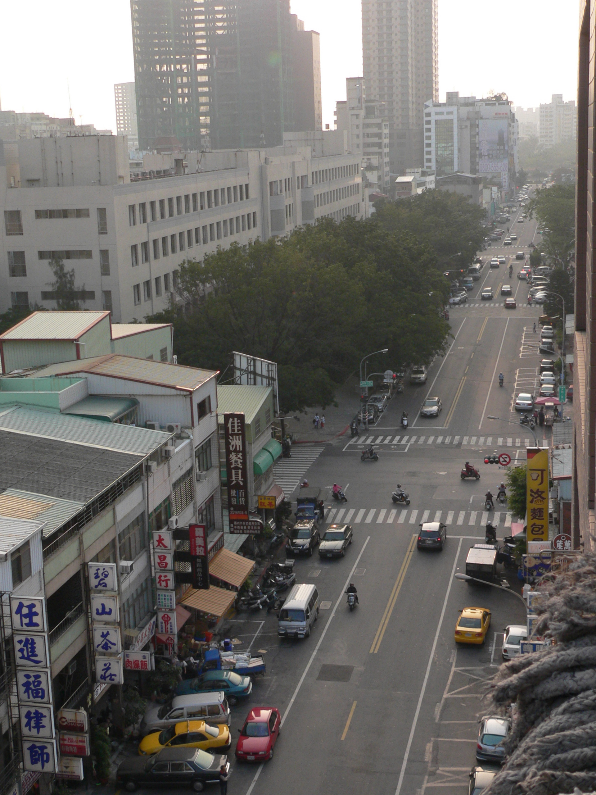 Datong Road, Kaohsiung